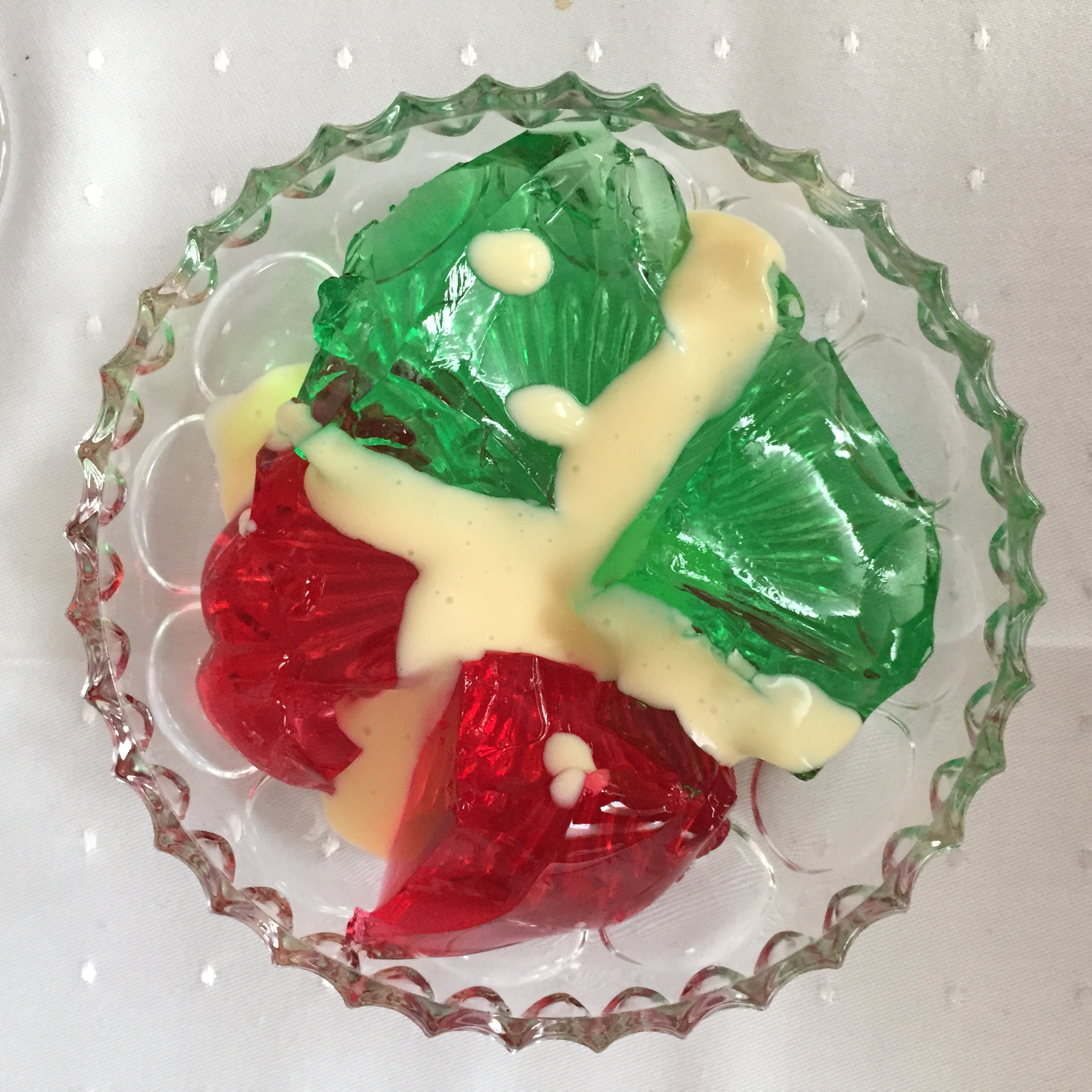 Wackelpuuding rot / grün mit Vanillie - norddeutsch